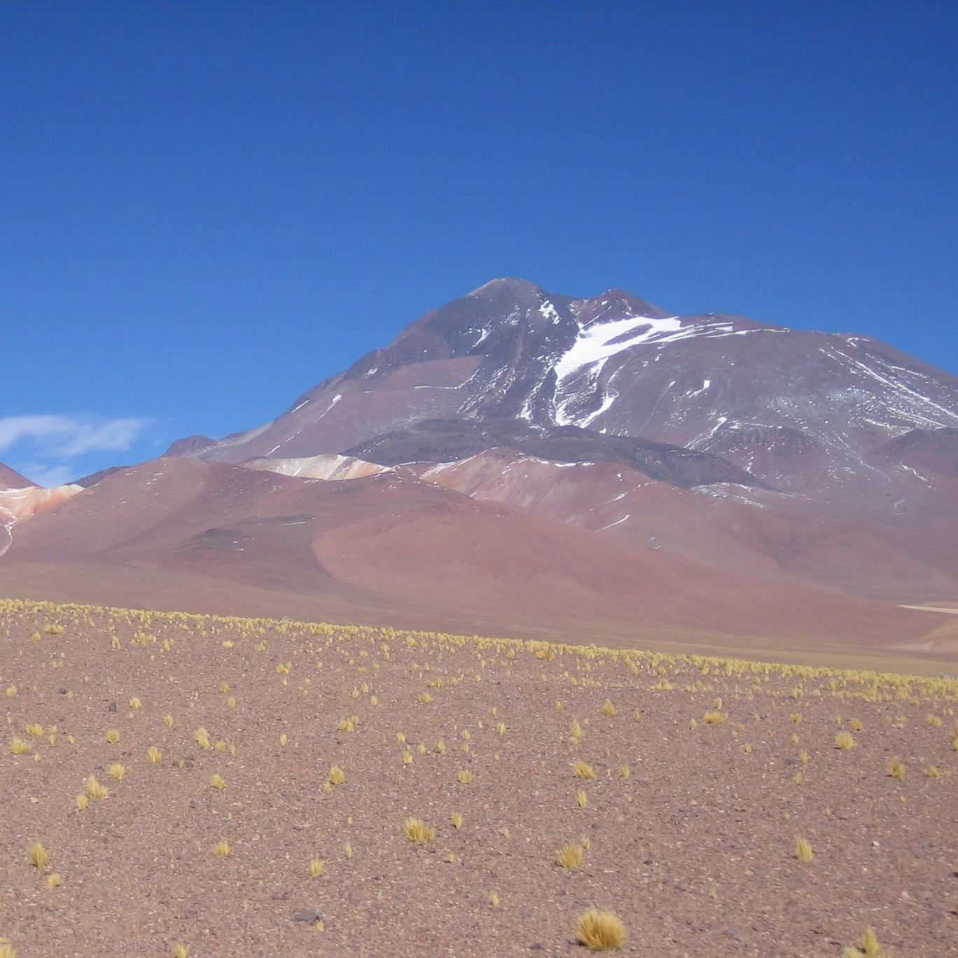 Llullaillaco, 2. Region of Chile, 2006